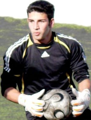 футбольный вратарь Вагиф Ширинбеков (Азербайджан)